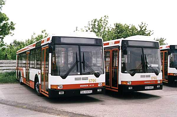 Bratislavské Ikarusy 412